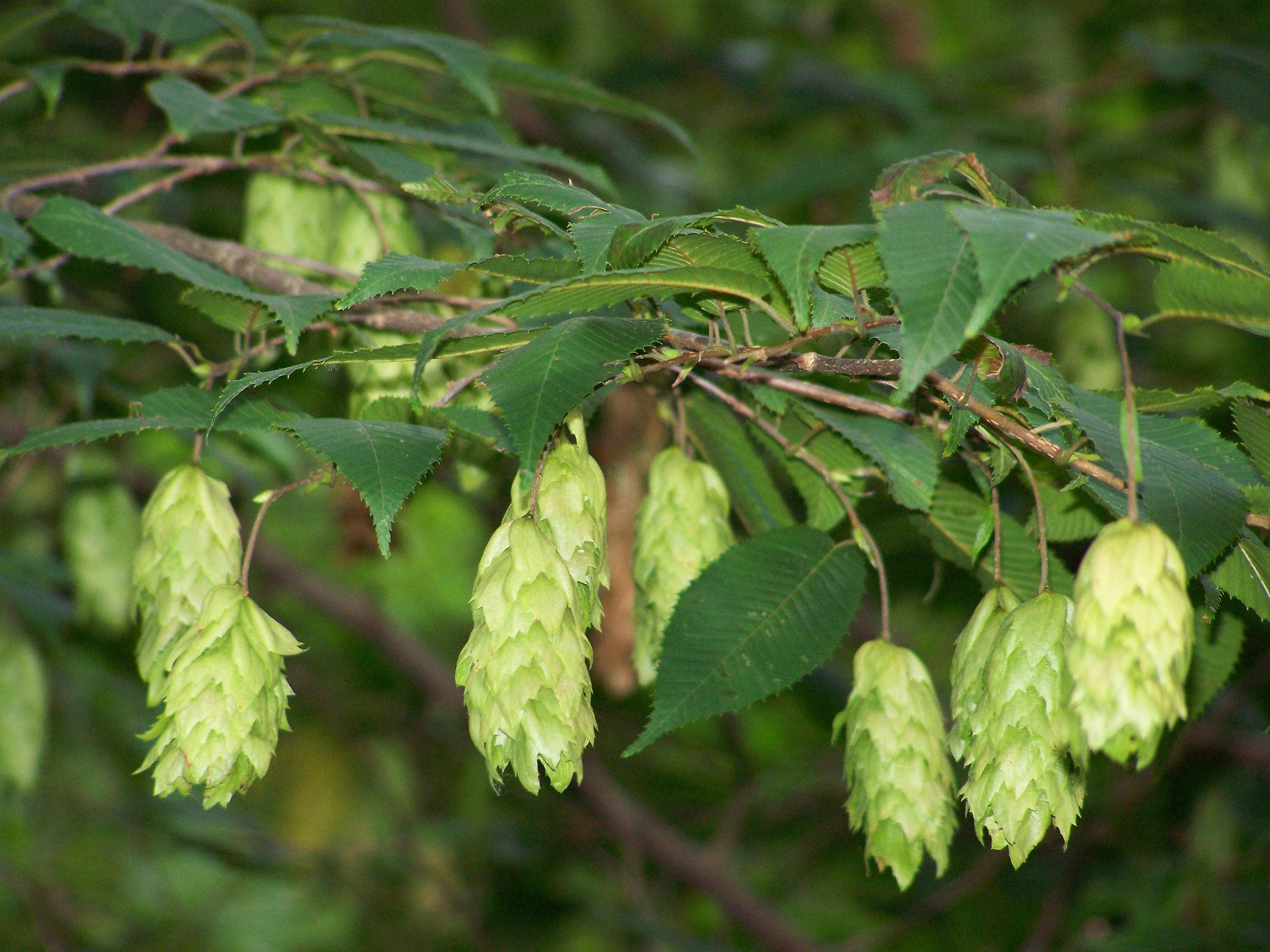 Japanische Hainbuche Carpinus japonica, Botanischer Garten Berlin